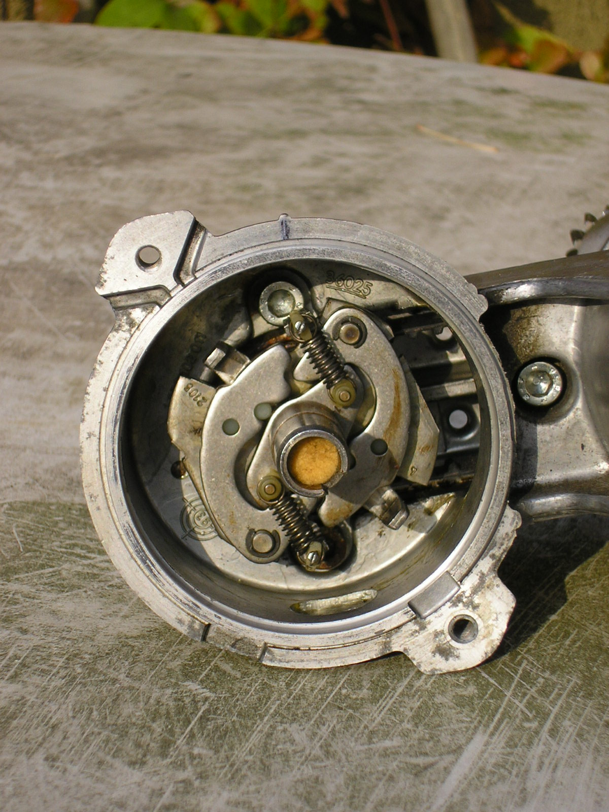 Fliehkraftverstelleinrichtung eines Zündverteilers